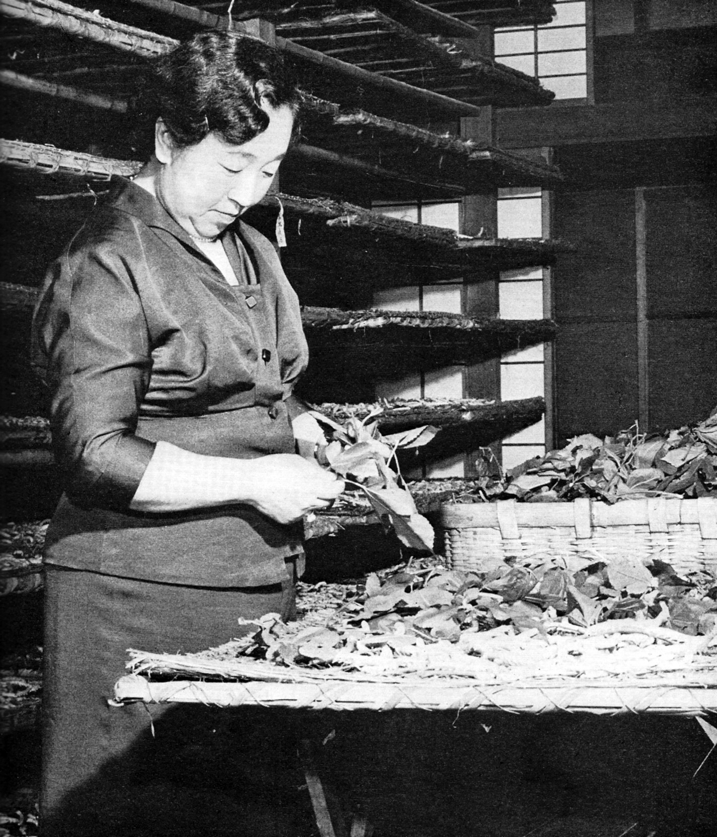 皇居内の御養蚕所にて、養蚕をする香淳皇后